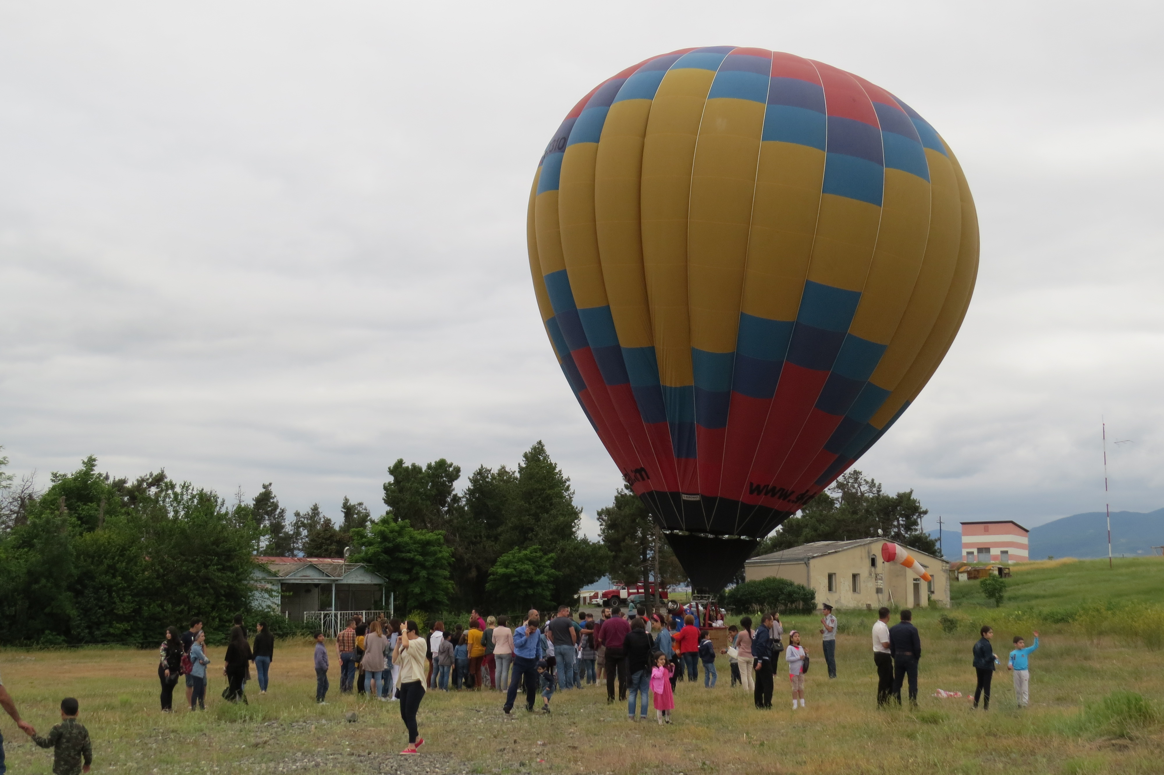 Արցախ ԷյրՖեստ